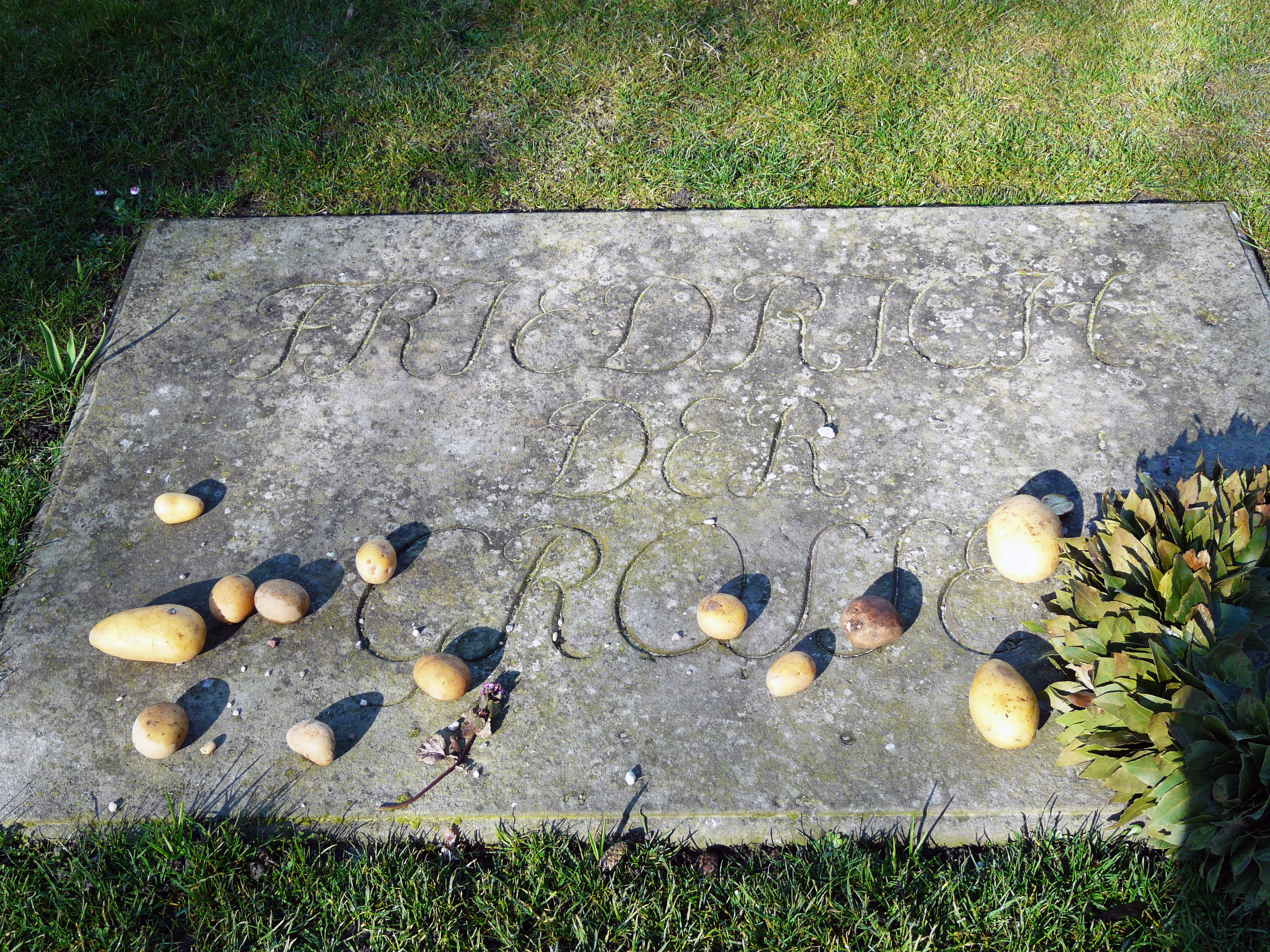 Картофель на надгробной плите